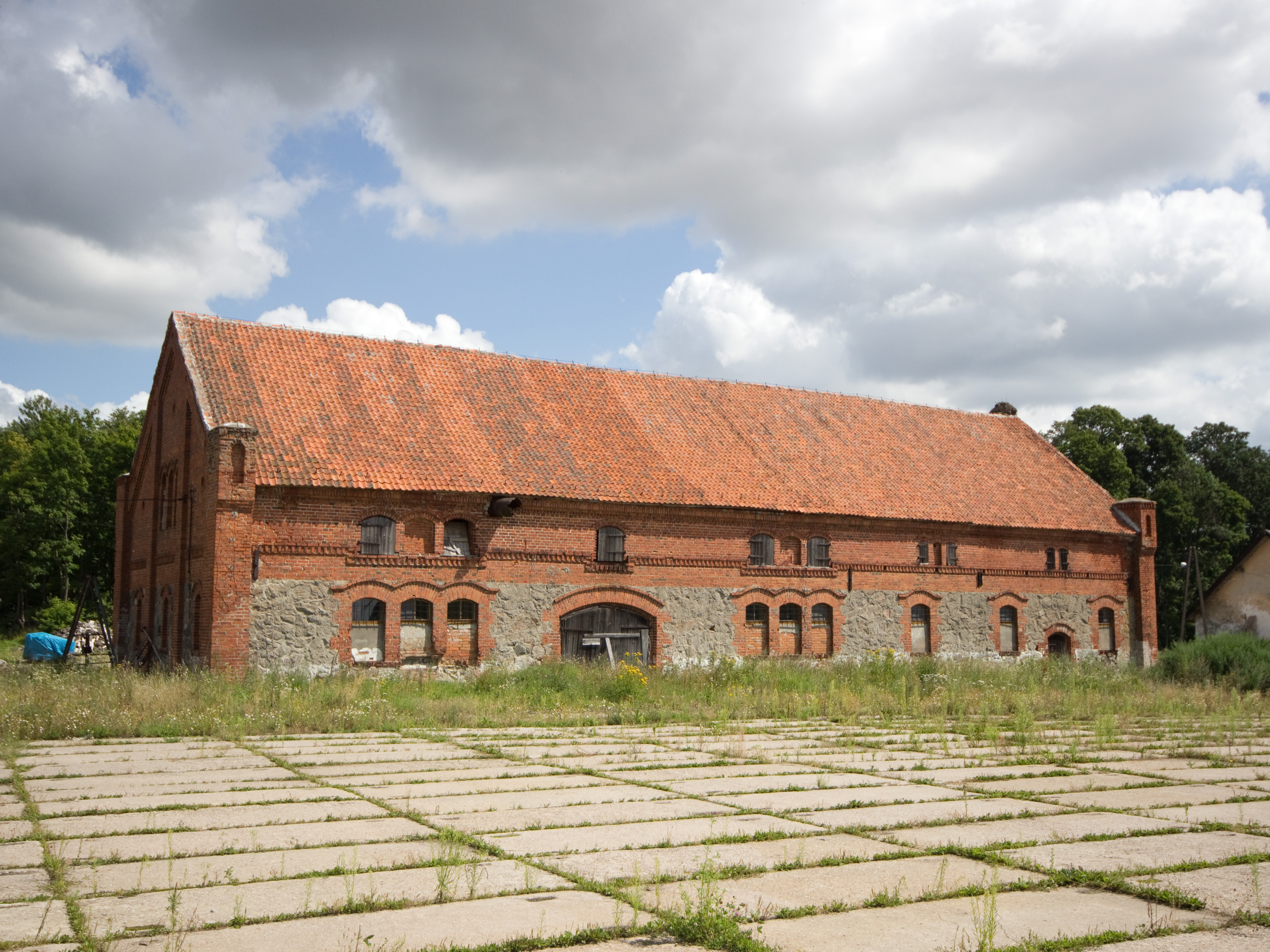 Statek, Bezledy, Varmijsko-mazurské vojvodství